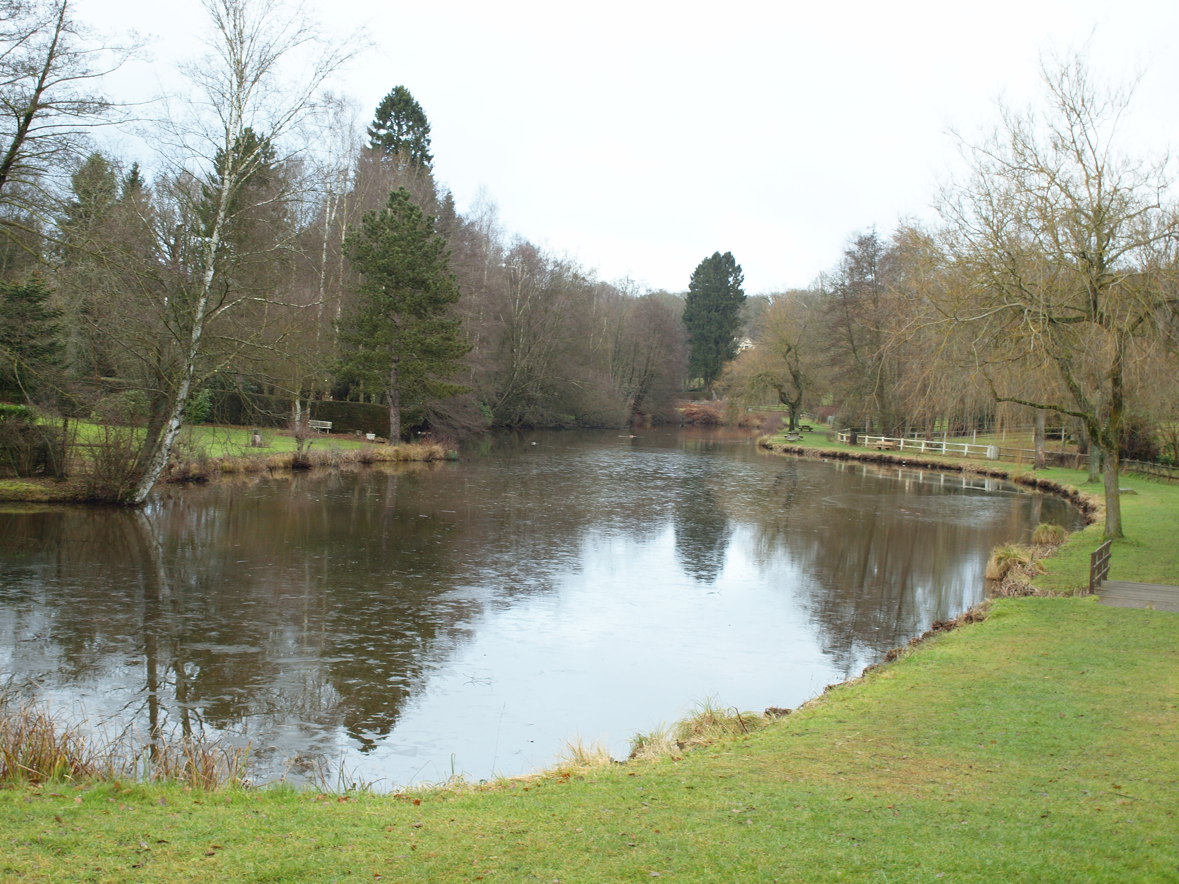 Forges-les-Eaux (Seine-Maritime, France)